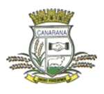 Brasão_Canarana_MT.gif